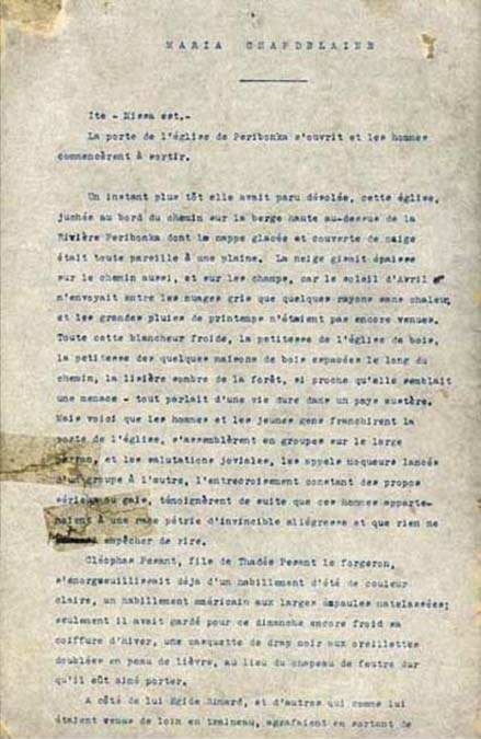 Première page du manuscrit (ou tapuscrit) original Maria Chapdelaine de Louis Hémon. Au début d'avril 1913, de retour à Montréal, Louis Hémon travaille comme traducteur pour l'entreprise Lewis Brothers Limited, tout en dactylographiant son roman sur la machine de son employeur en arrivant tôt le matin au bureau. Le 26 juin, il expédie celui-ci au journal Le Temps, qui le publiera l'année suivante.